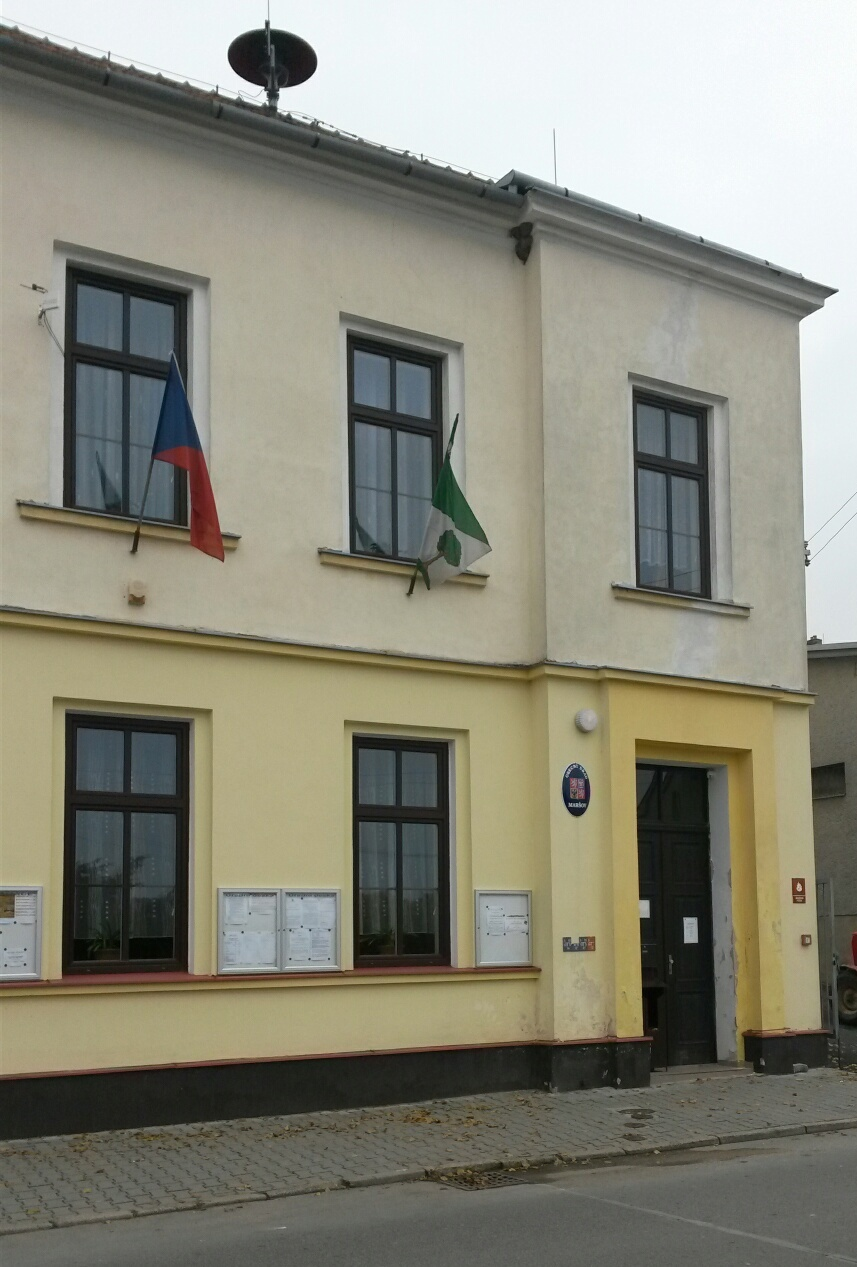 obecní úřad v Maršově (2016)